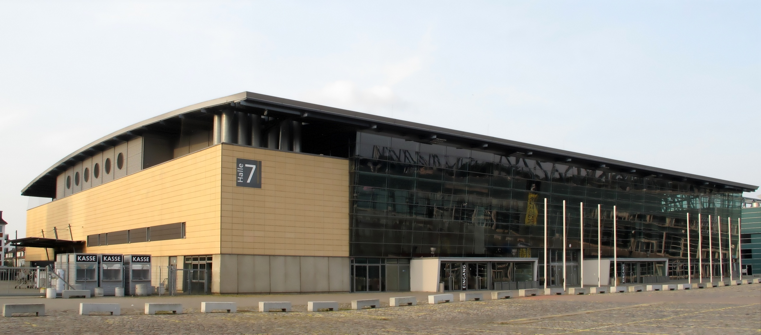 Bremen, Messe- und Veranstaltungszentrum, Messehalle 7, Ansicht Bürgerweide